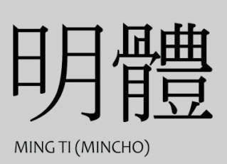 Style chimoi de fonte de police Ming Ti